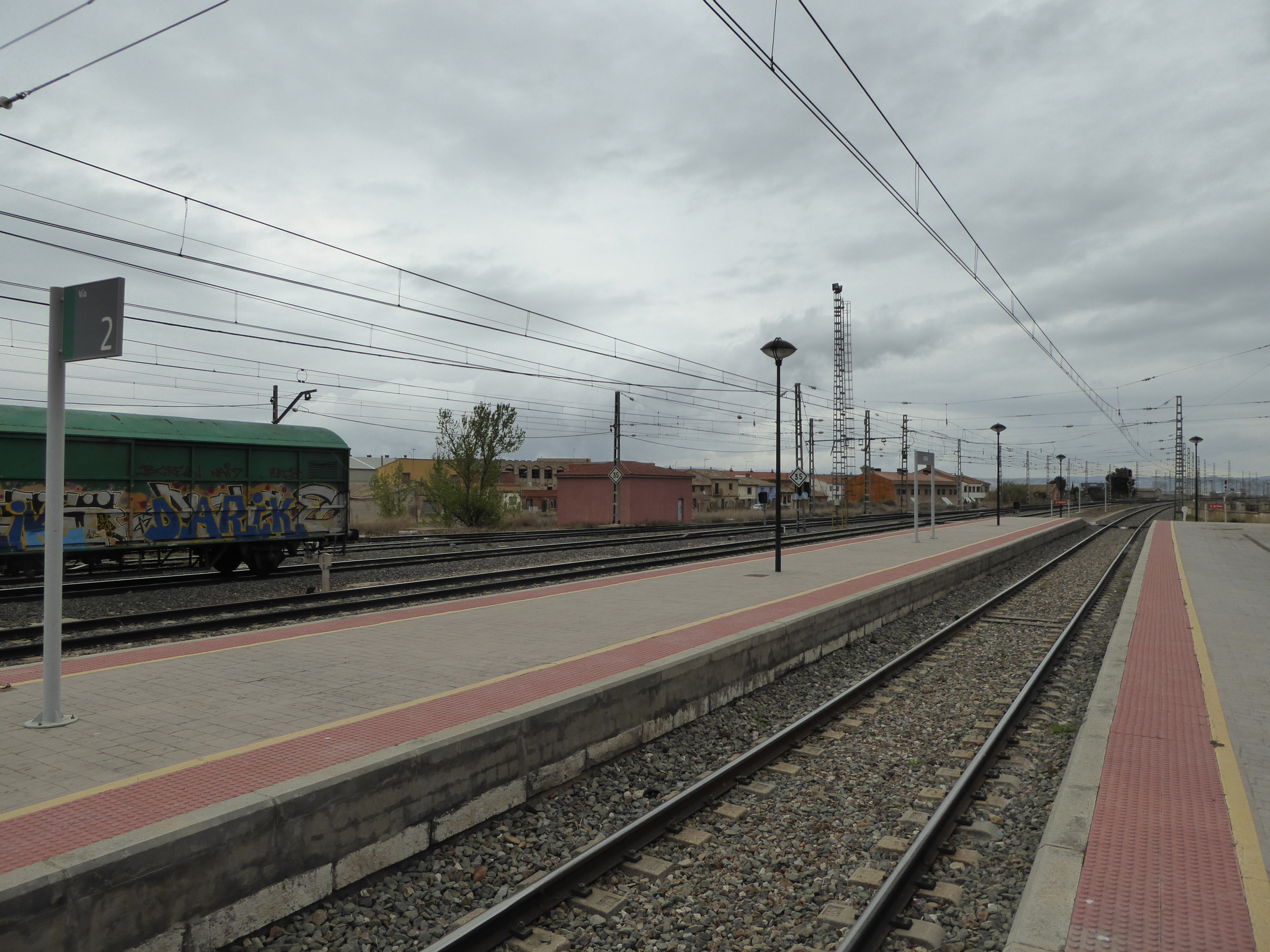 Grisén